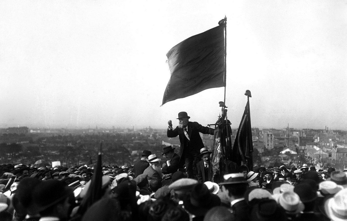 Jaurès en meeting au Pré-Saint-Gervais